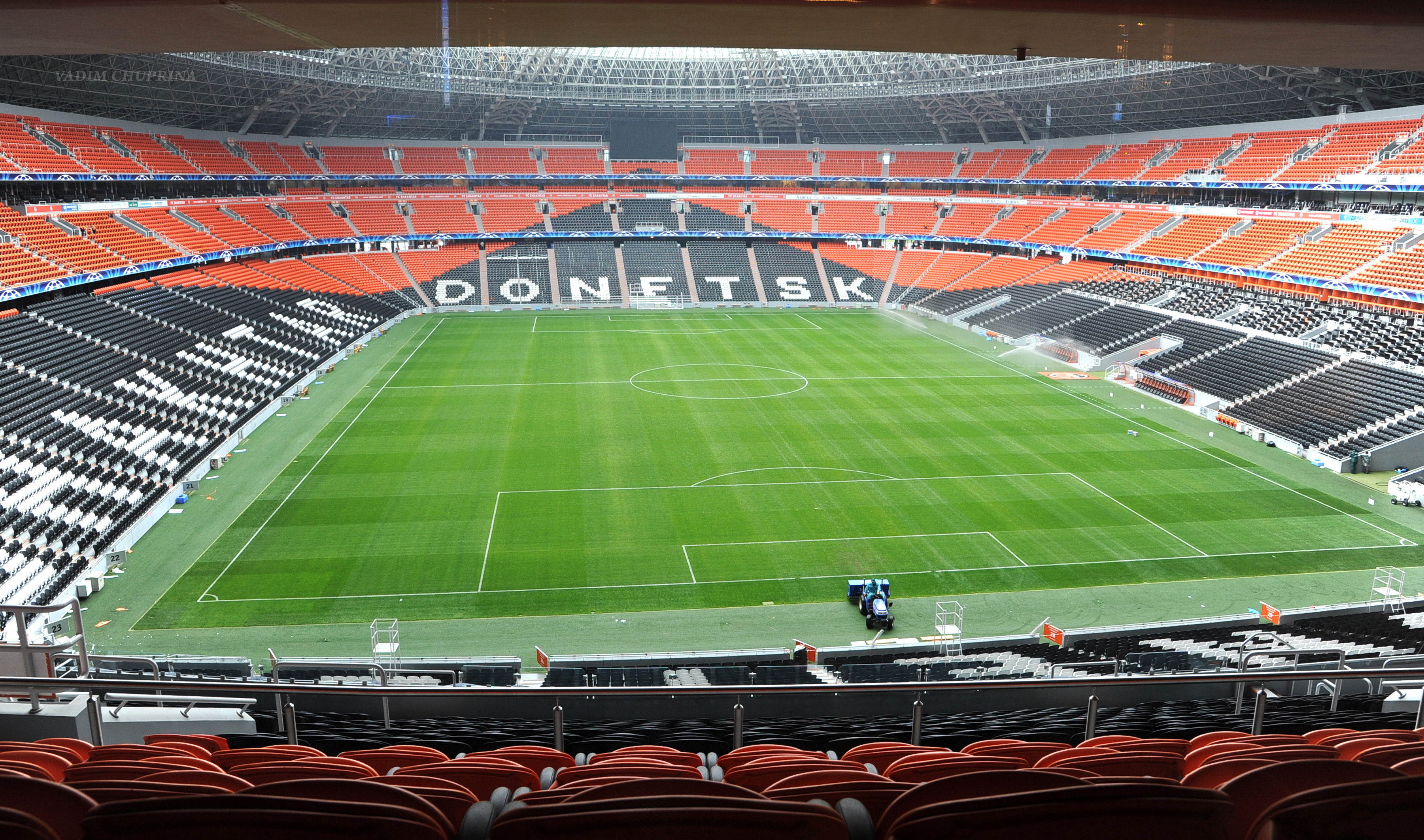 Donbass Arena 2011,фото Чуприна Вадим